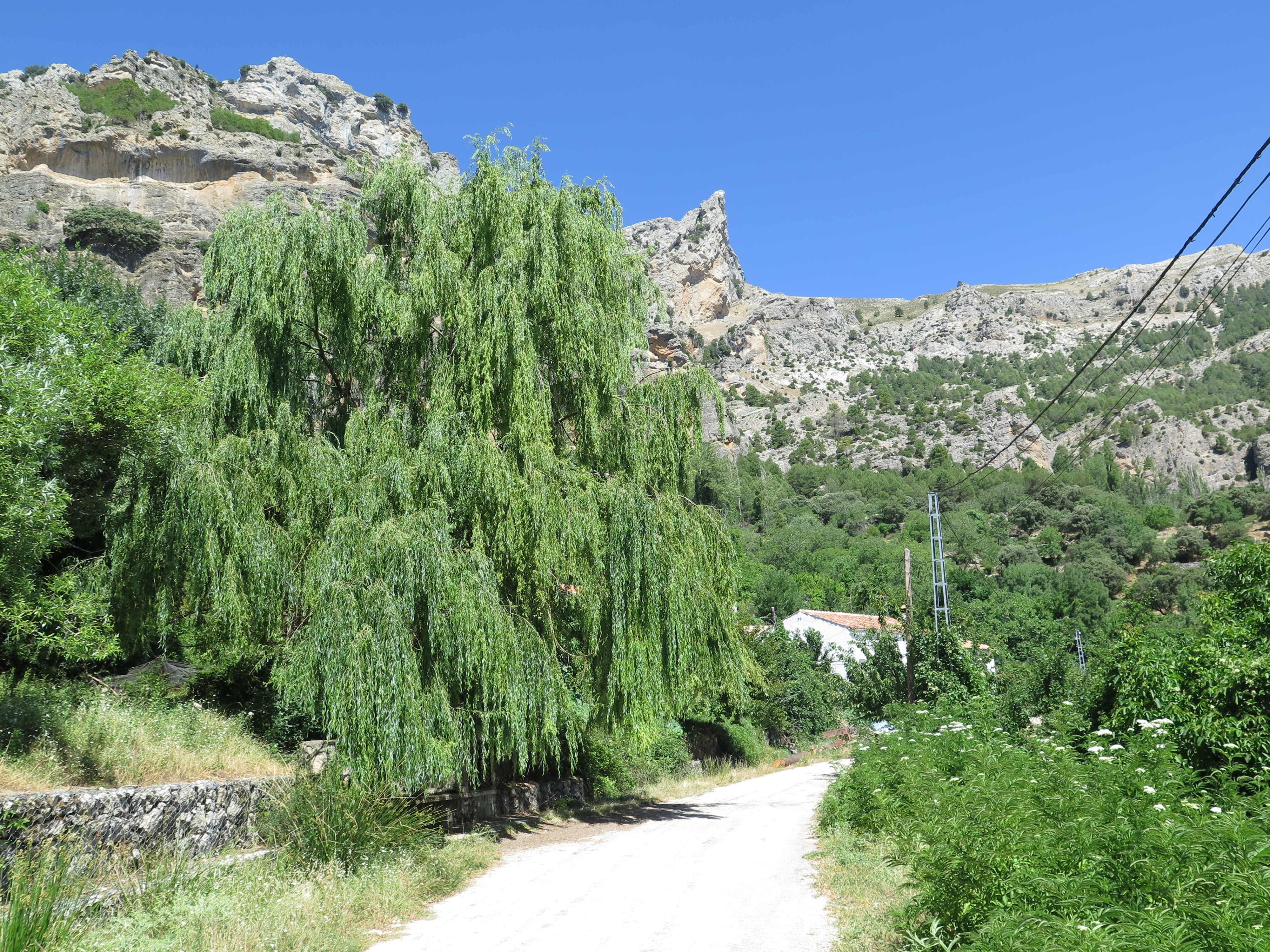 Arboleda y fuente en la aldea de Las Gorgollitas.